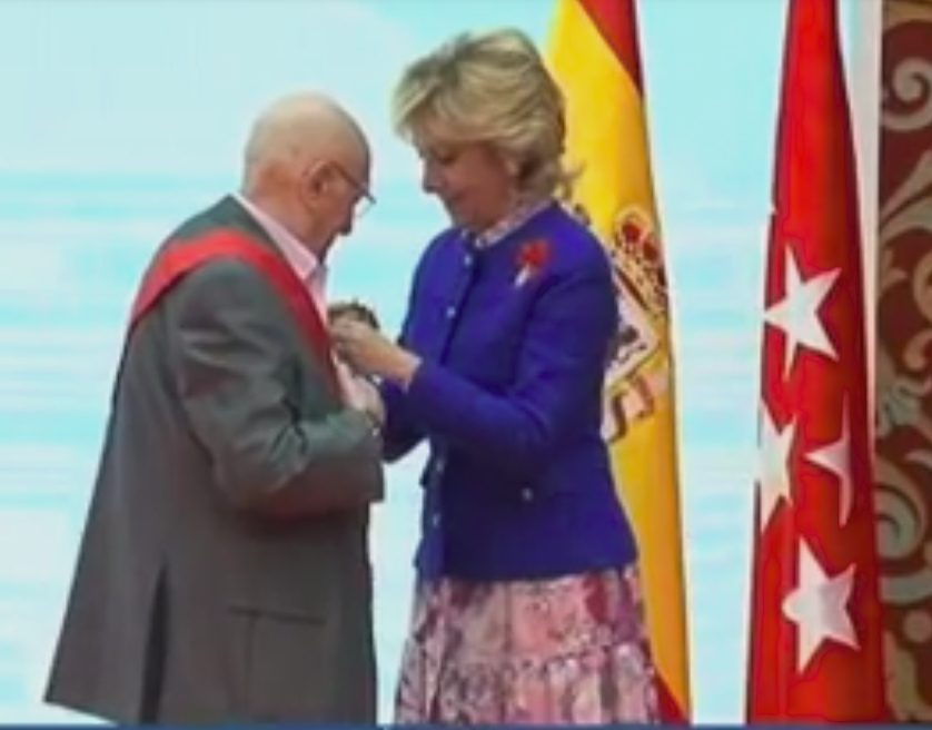 La Presidenta de la Comunidad de Madrid, Esperanza Aguirre, entrega, en la sede de la Presidencia del Gobierno regional, las medallas y condecoraciones de la Comunidad de Madrid.